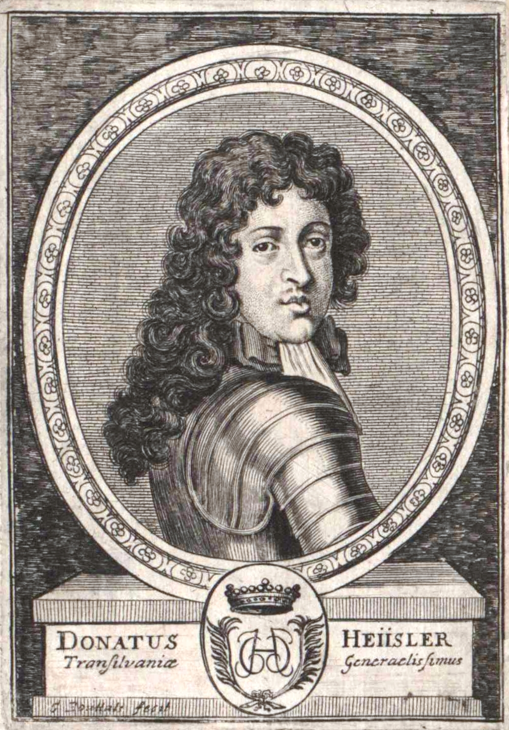 Donatus Graf Heißler von Heitersheim (1648–1696)